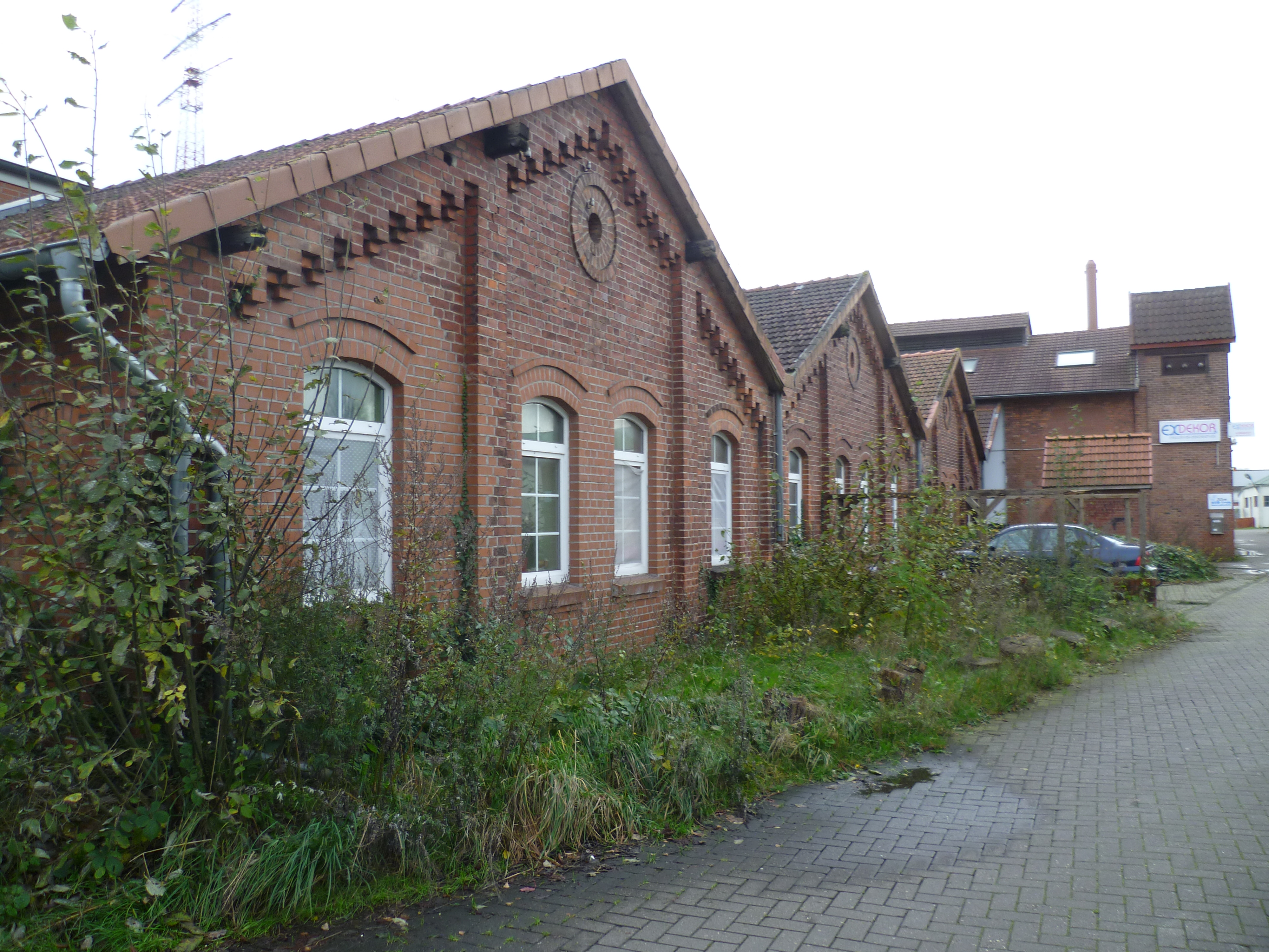 Gebäude der ehemaligen Stuhlrohrfabrik von 1893, im heutigen Industriegebiet Bernhardt-Ring in Farge